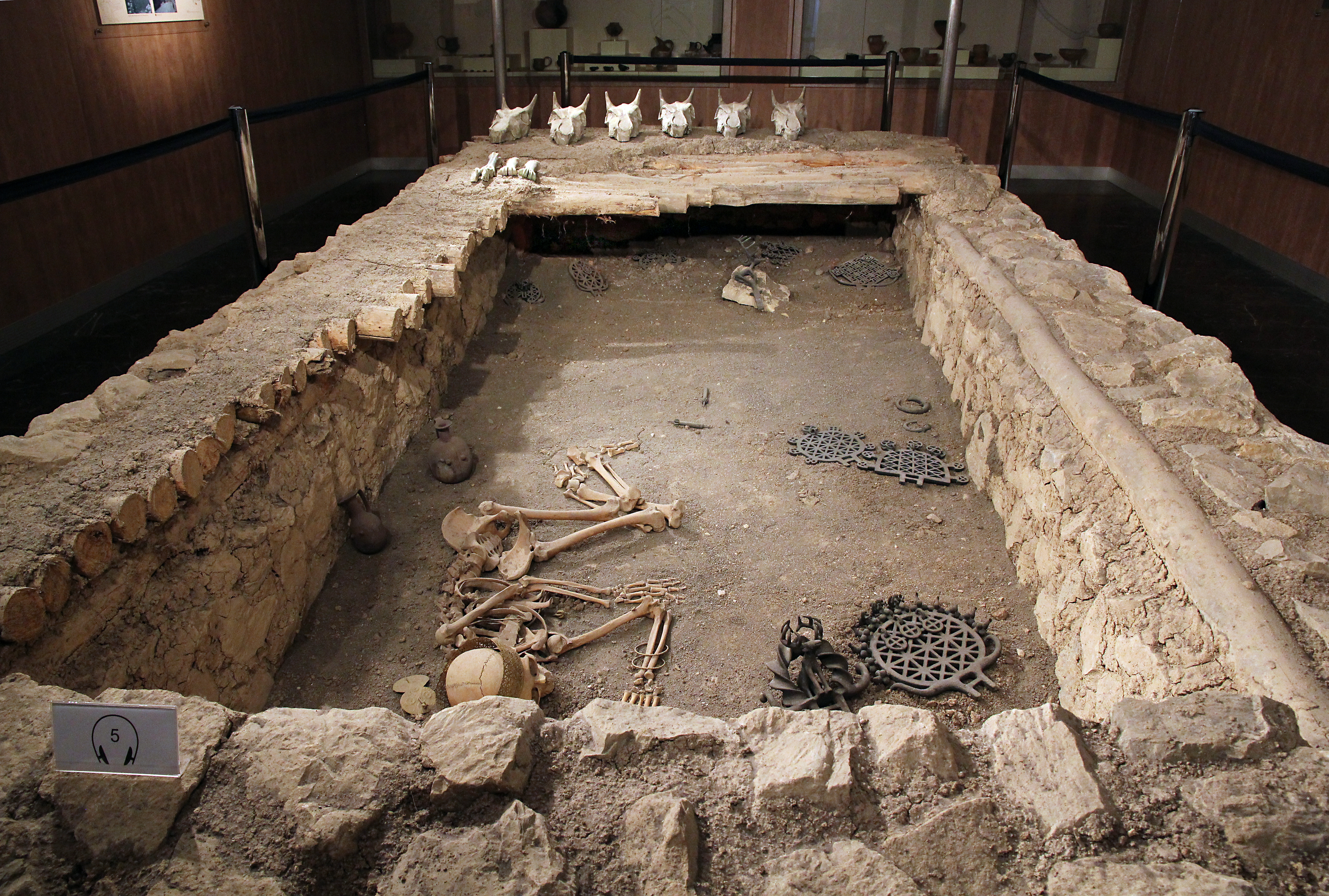 Archäologisches Museum Çorum, Zentraltürkei, Nachbau eines bronzezeitlichen Fürstengrabs aus Alaca Höyük